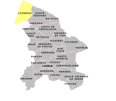 Localisation de Coimbrao.PNG sur la freguesia de Leiria.